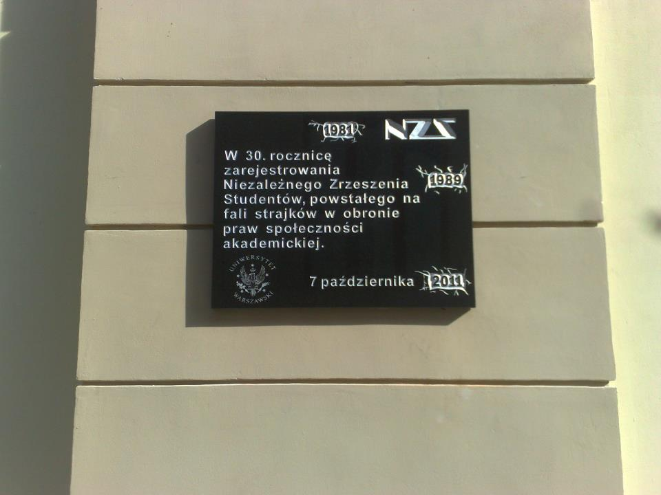 Tablica NZS UW na UW